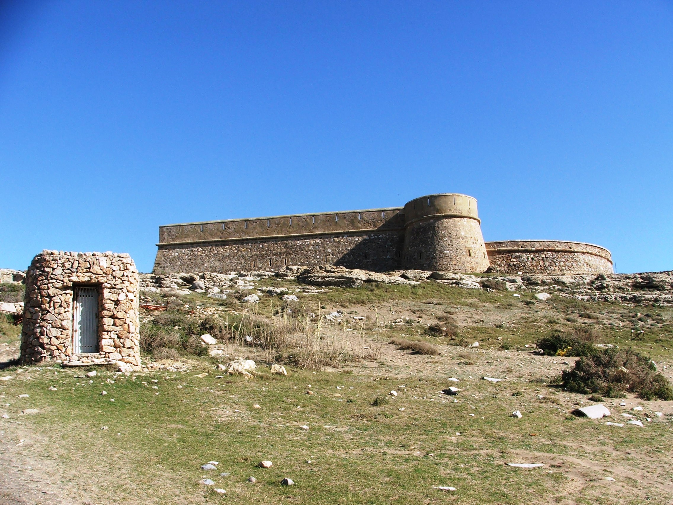 Fotografía del castillo de Guardias Viejas, El Ejido, Almería, Andalucía, España, desde el oeste.